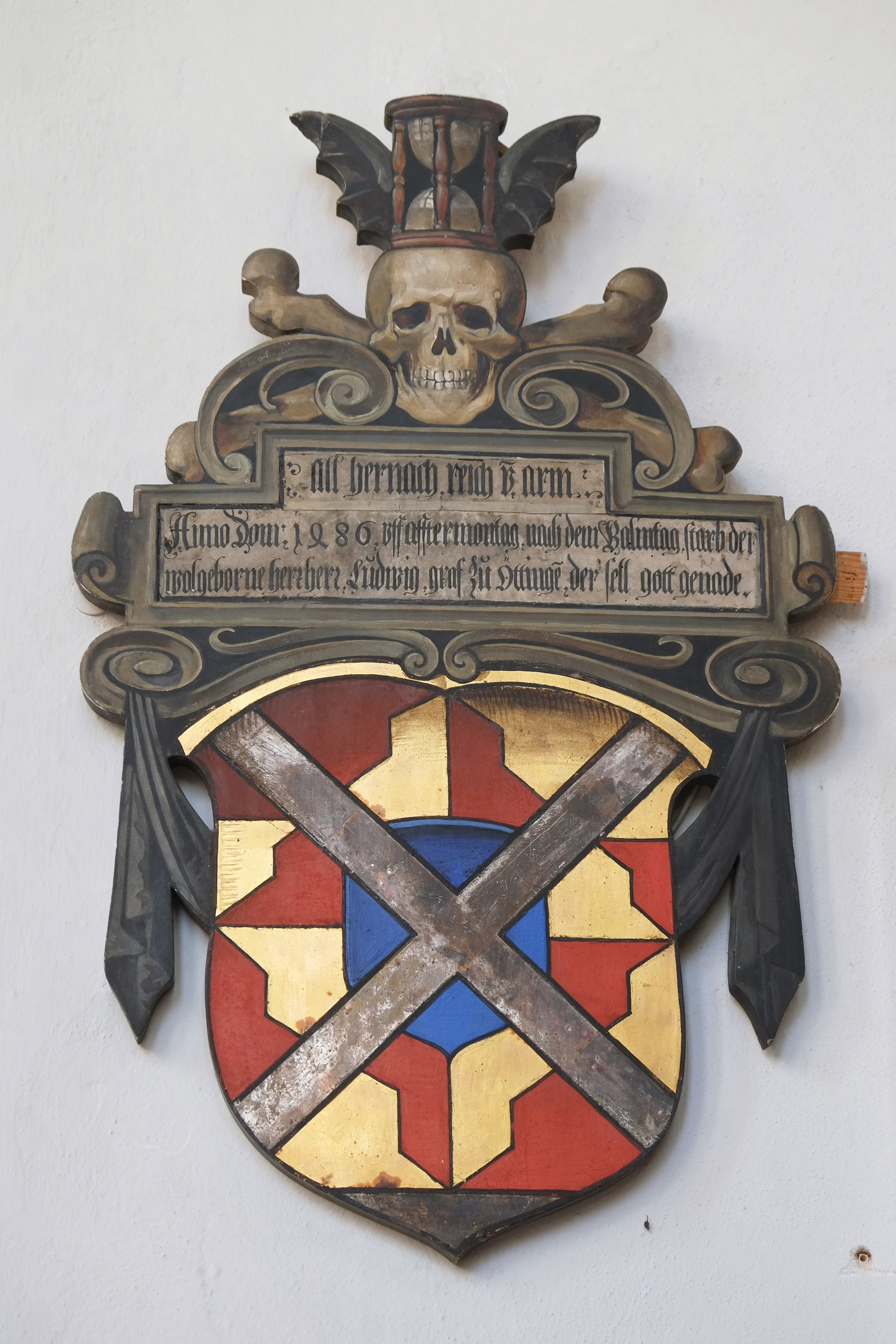 Evangelische Kirche St. Jakob in Oettingen in Bayern (Bayern), Totenschild für Graf Ludwig XIII. von Oettingen